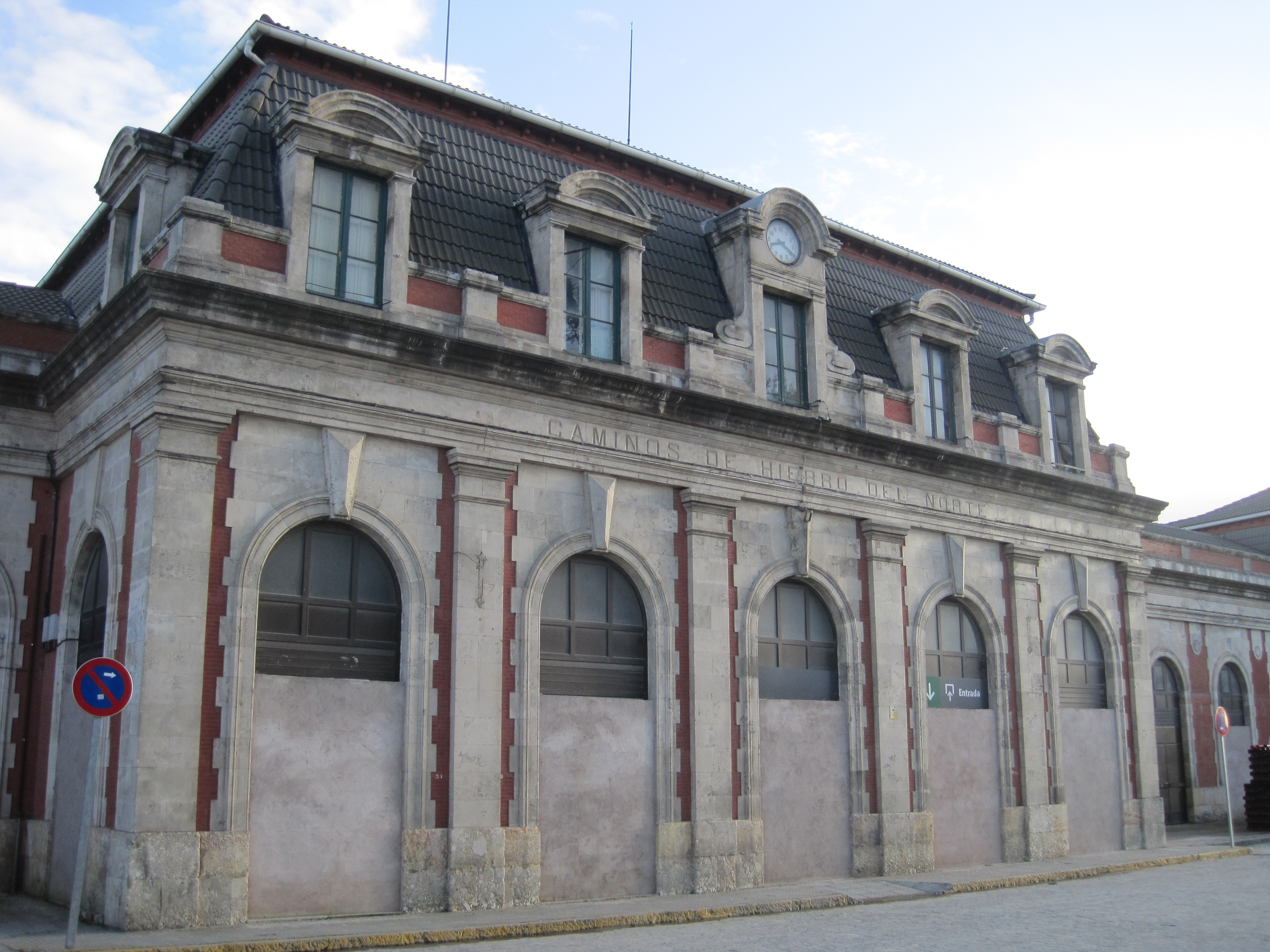 Vista externa de la antigua estacion de renfe de Burgos, la llamada estación del norte